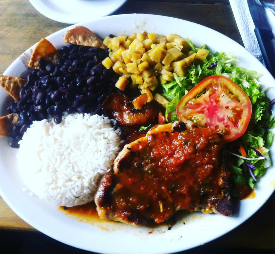 Casado costarricense servido en restaurante típico de San José, Costa Rica